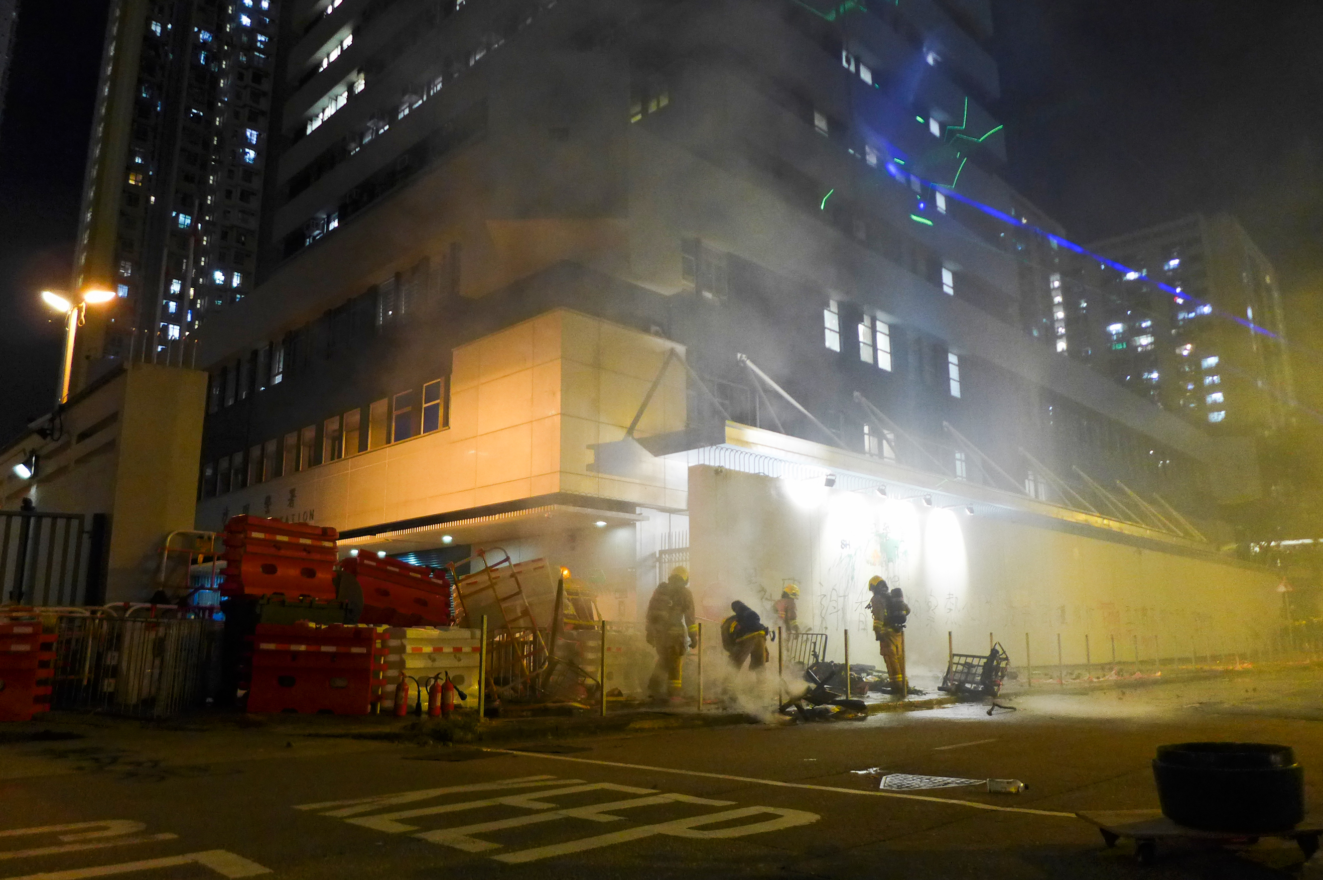 2019年8月5日香港三罷行動